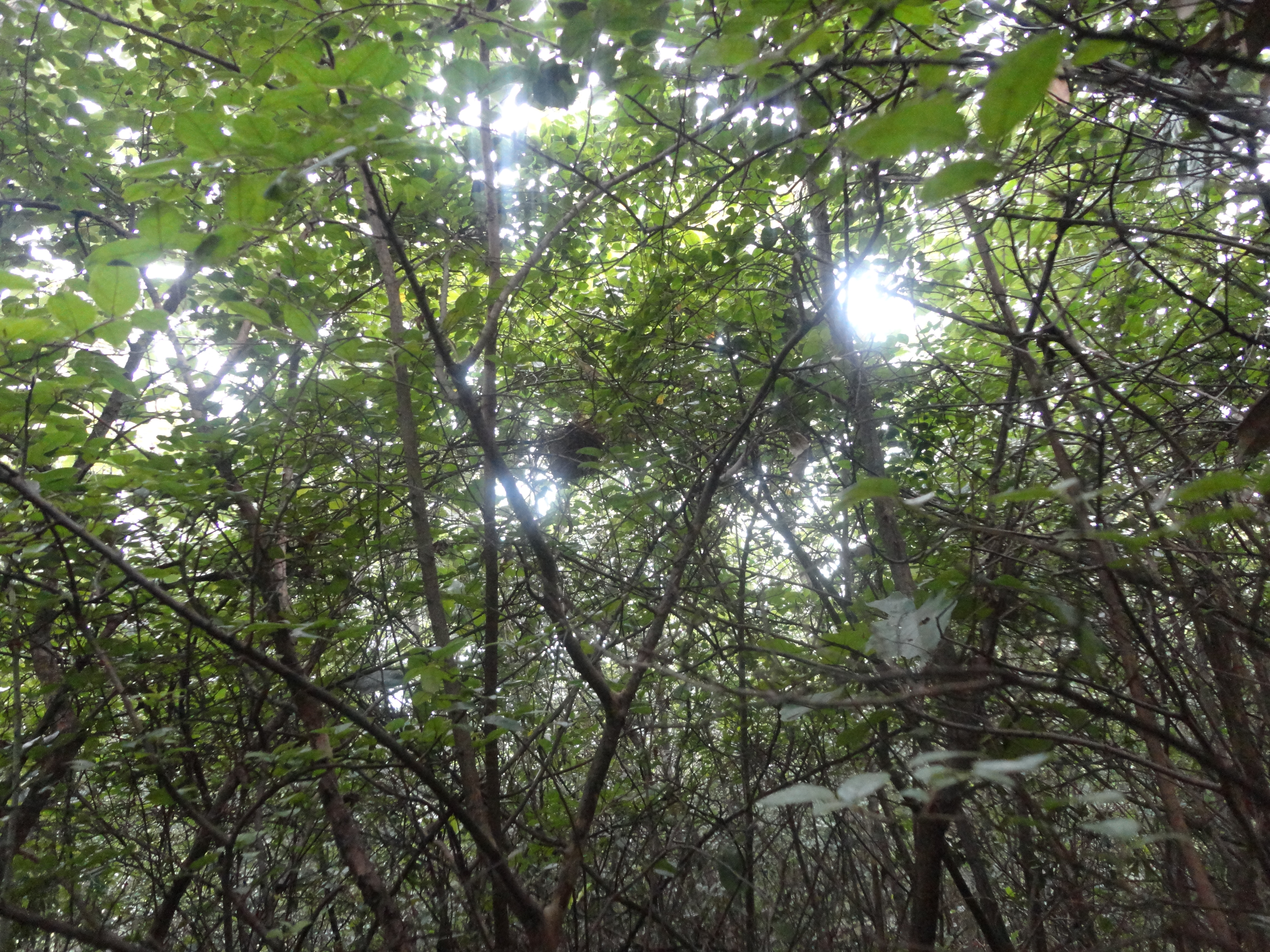 原生态森林中的鸟窝